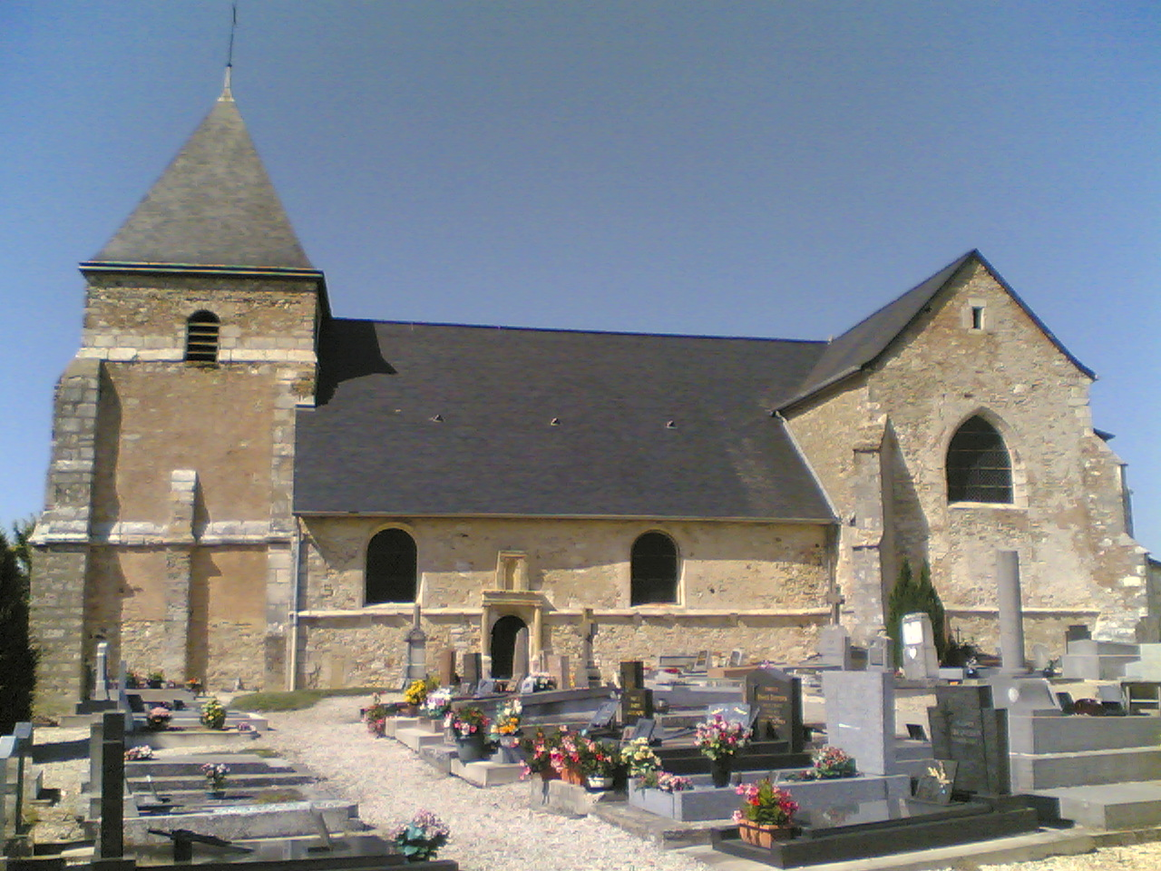 Eglise de Chavot (Champagne)